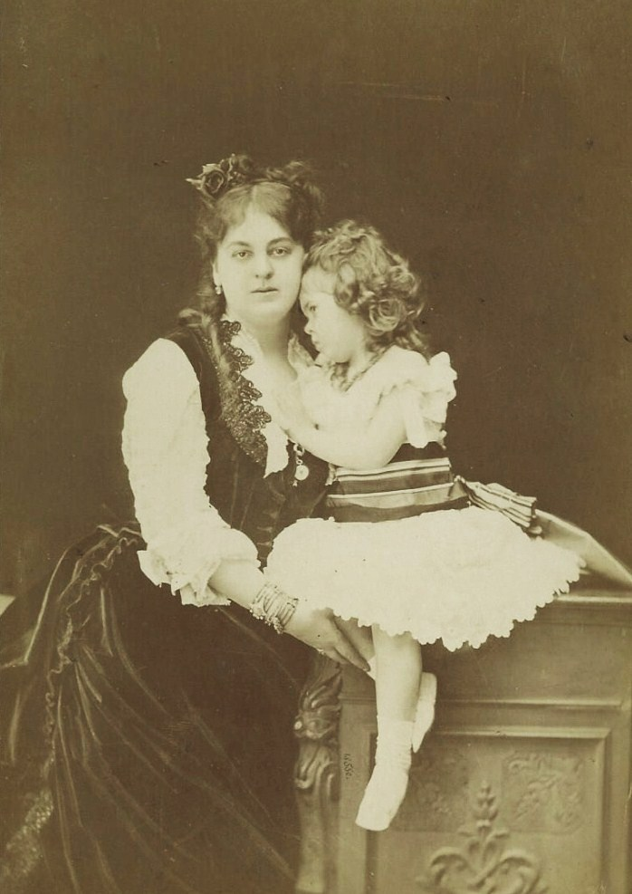 Ольга Дмитриевна Шереметева, урож. Скобелева (1847—1898) с дочерью.